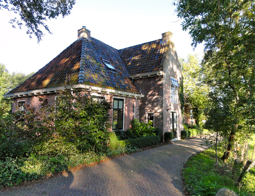 Pastorie van Foudgum aan het Piet Paaltjenspad, van 1859 tot 1862 de woning van ds. François Haverschmidt